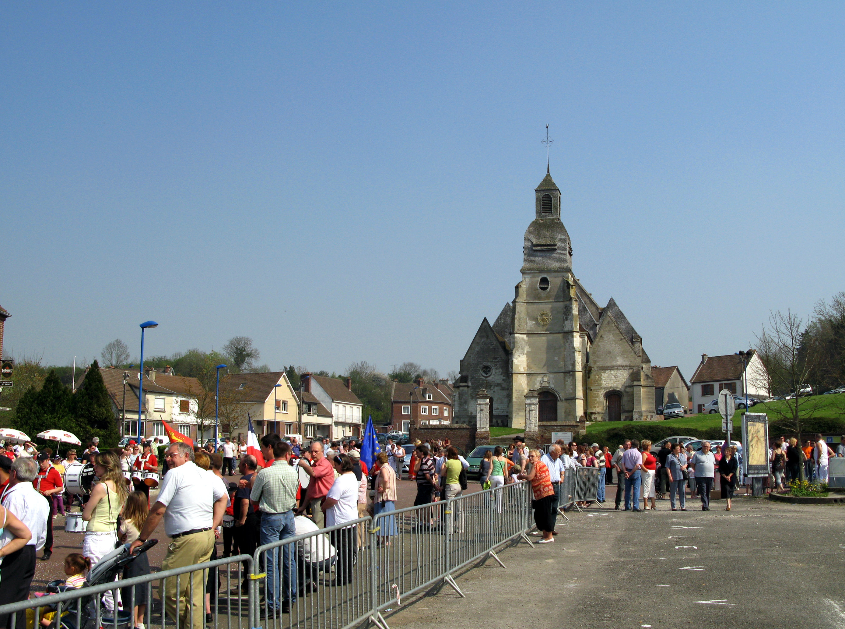 Airaines (Somme, France) - Animation festive au centre-ville, un dimanche de printemps. . .